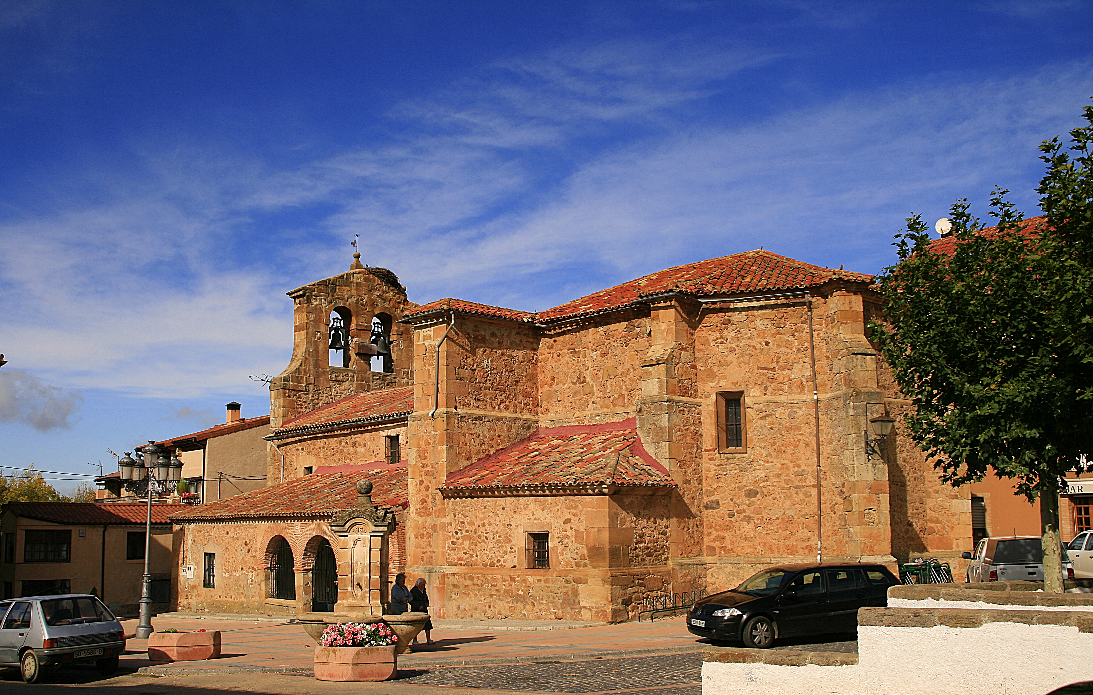 La iglesia parroquial de San Juan Bautista de Garray es obra gótica del siglo XVI construida sobre otra anterior románica de la que se conserva una sencilla portada de dos arquivoltas y guardapolvos sobre las impostas y jambas.